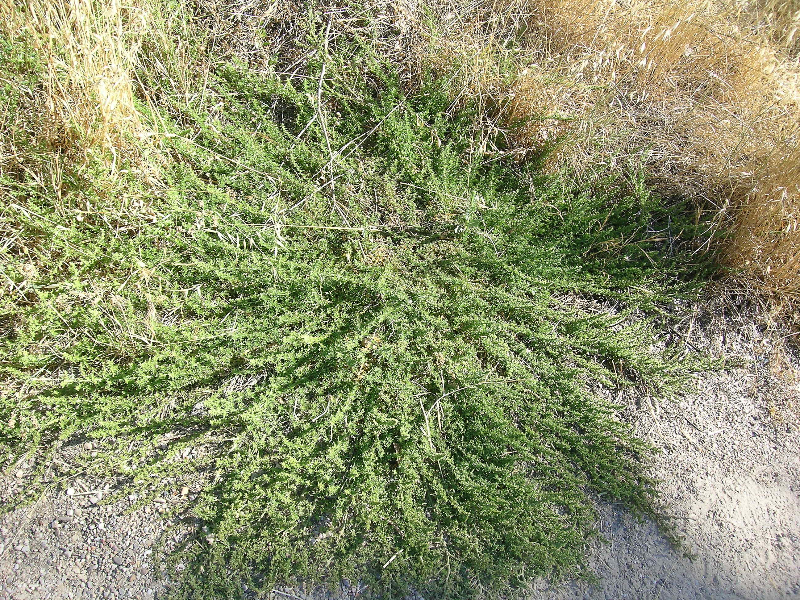 Dysphania multifida hábito